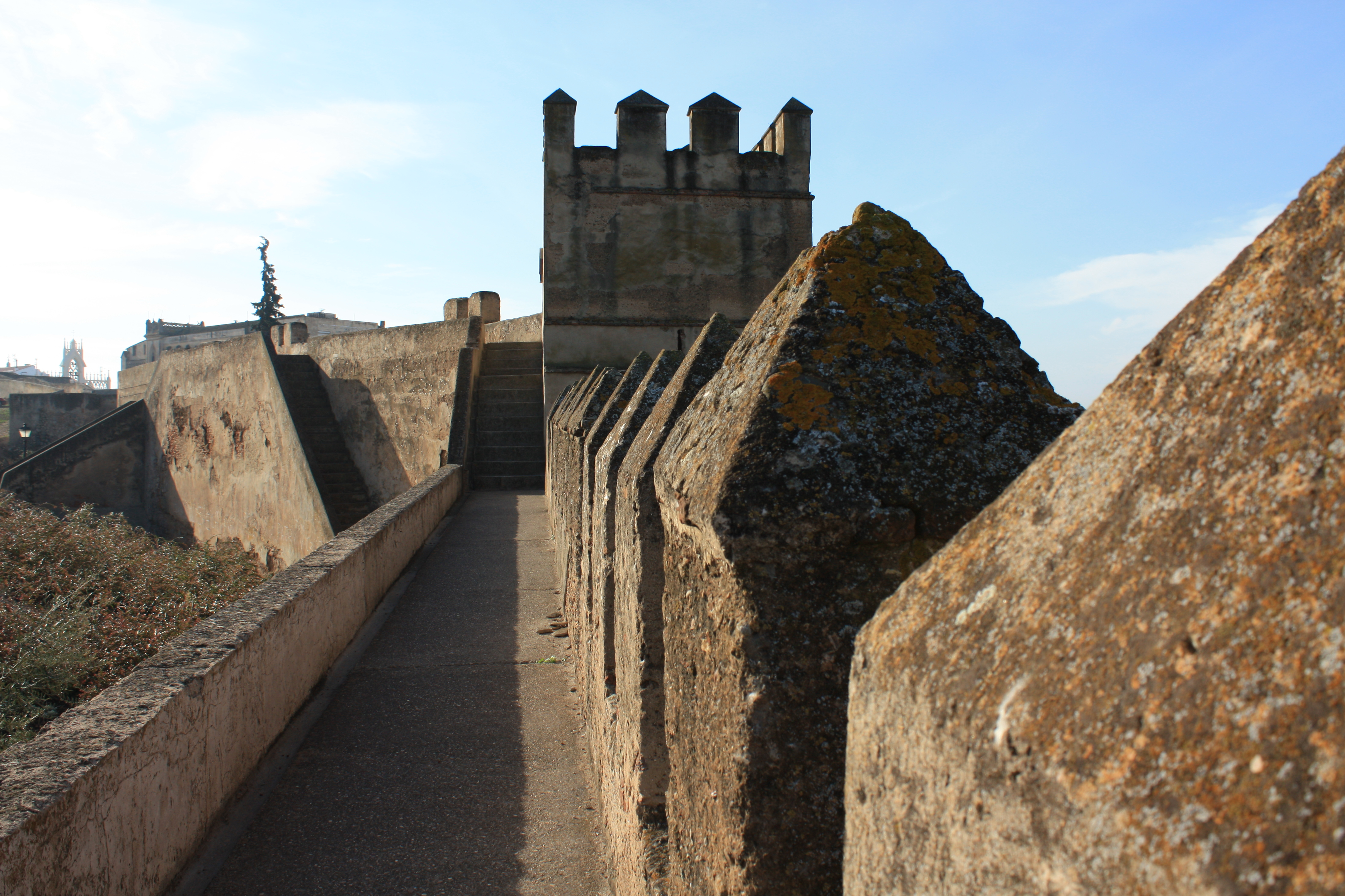 Wall of Alcazaba, Badajoz (ES)